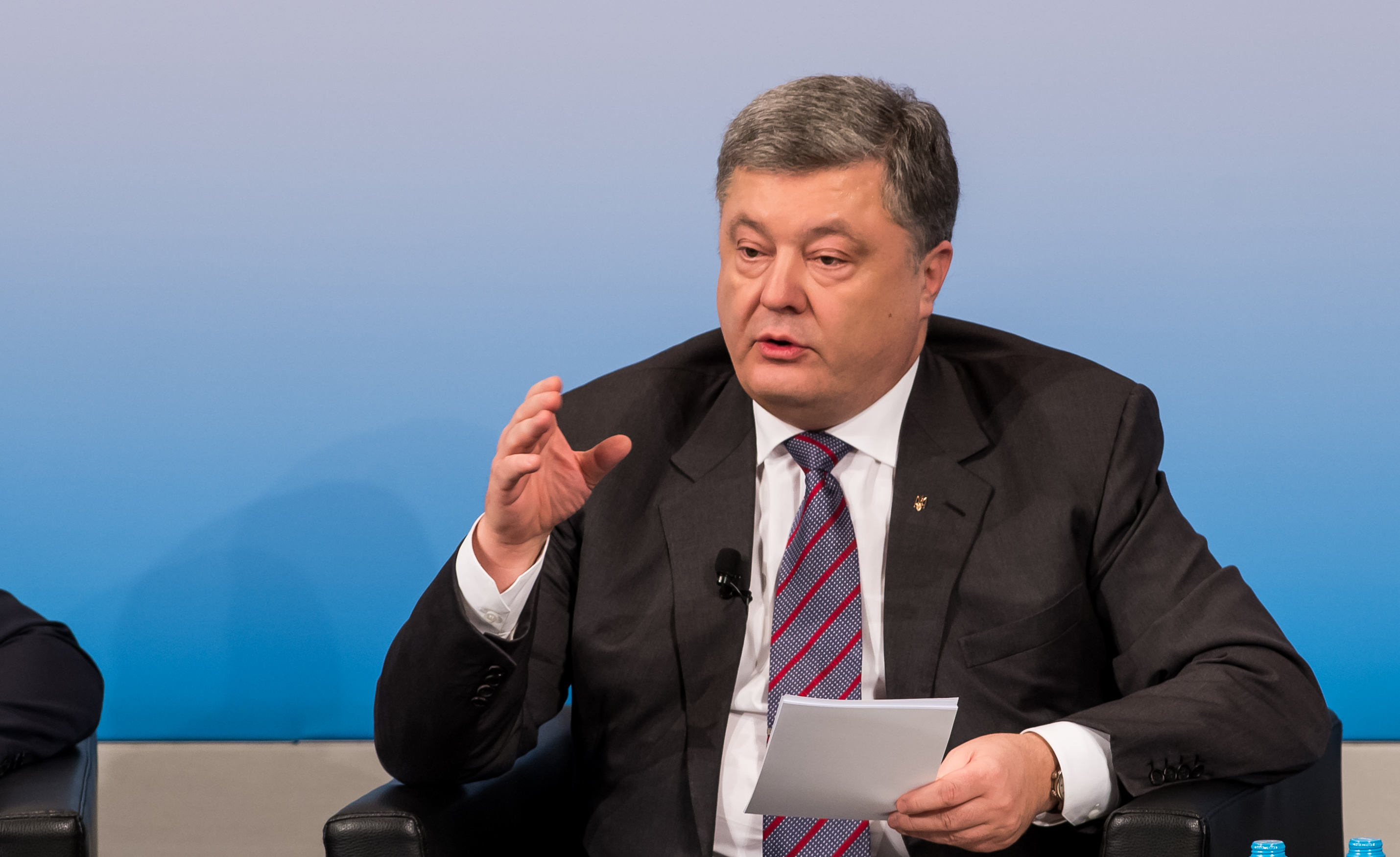 Petro Poroschenko während der Münchner Sicherheitskonferenz 2017